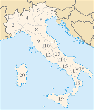 Любомир Таушанов, 2005 г.